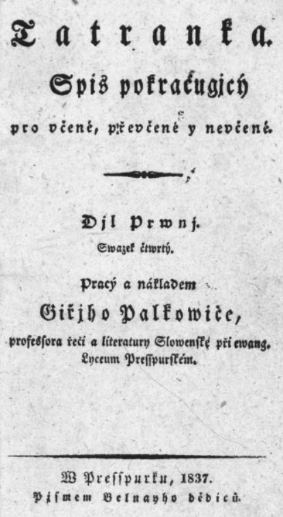 Titulný list časopisu Tatranka z r. 1837